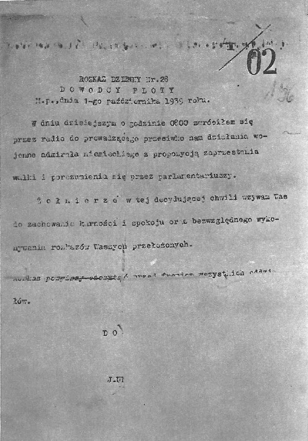 Ostatni rozkaz adm. Józefa Unruga o wszczęciu rozmów kapitulacyjnych z 1 października 1939 r.